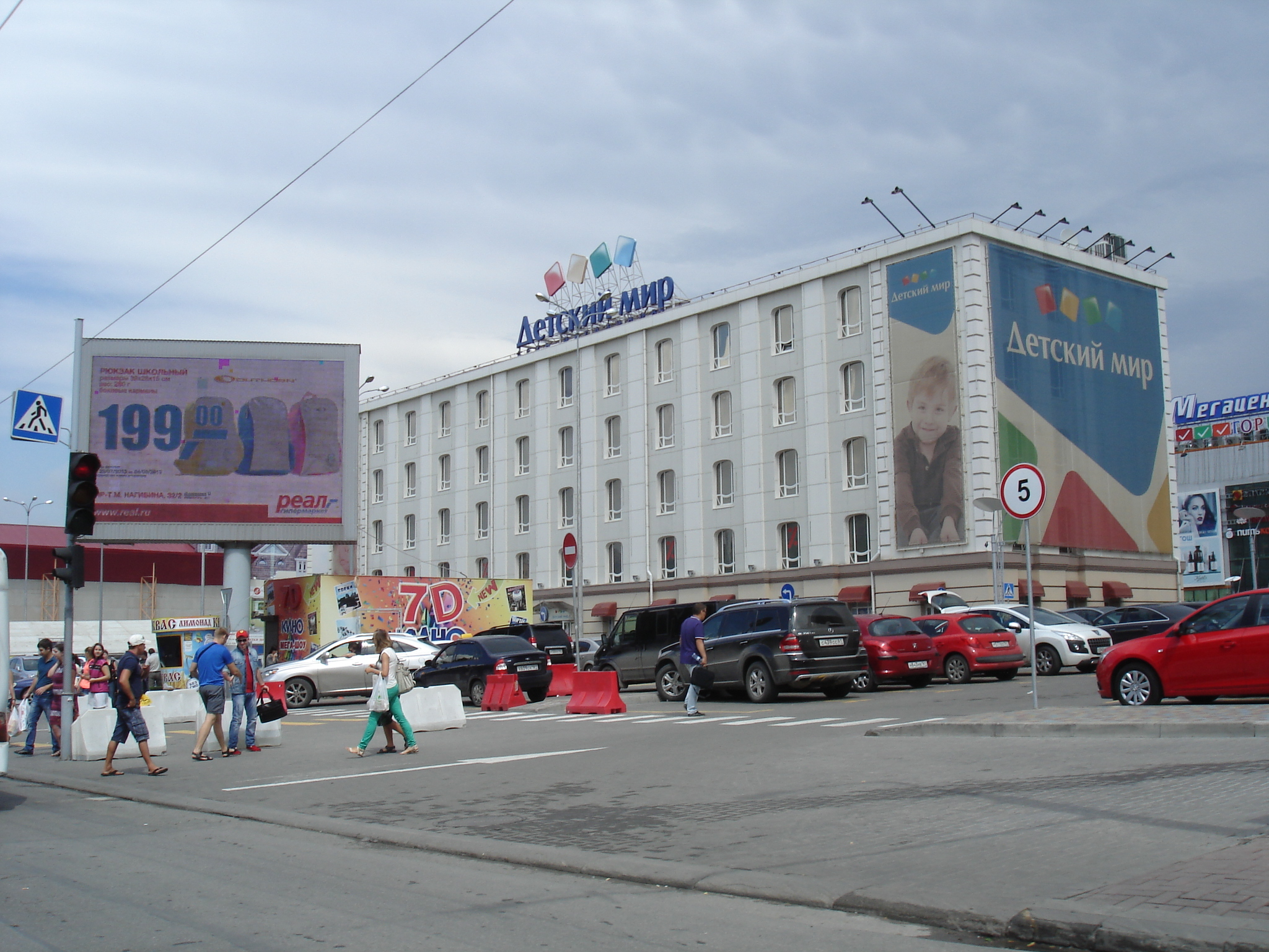 Ростов-на-Дону, магазин "Детский мир"